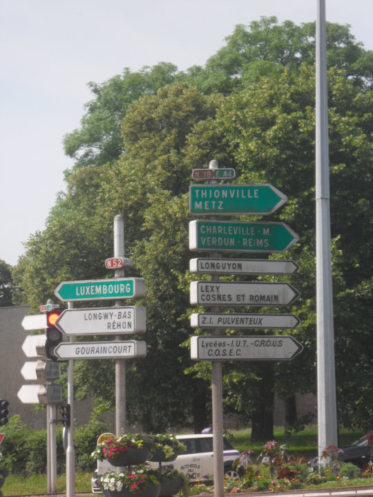 Straßenkreuzung der ehemaligen französischen Nationalstraßen 18 und 52 in Longwy — an dieser Stelle mündete die N52 in die N18 nach dem Netz 1973. Heute existiert die Département-Straße 520 in beiden Richtungen, aber noch immer sind die alten Nummern ausgeschildert.